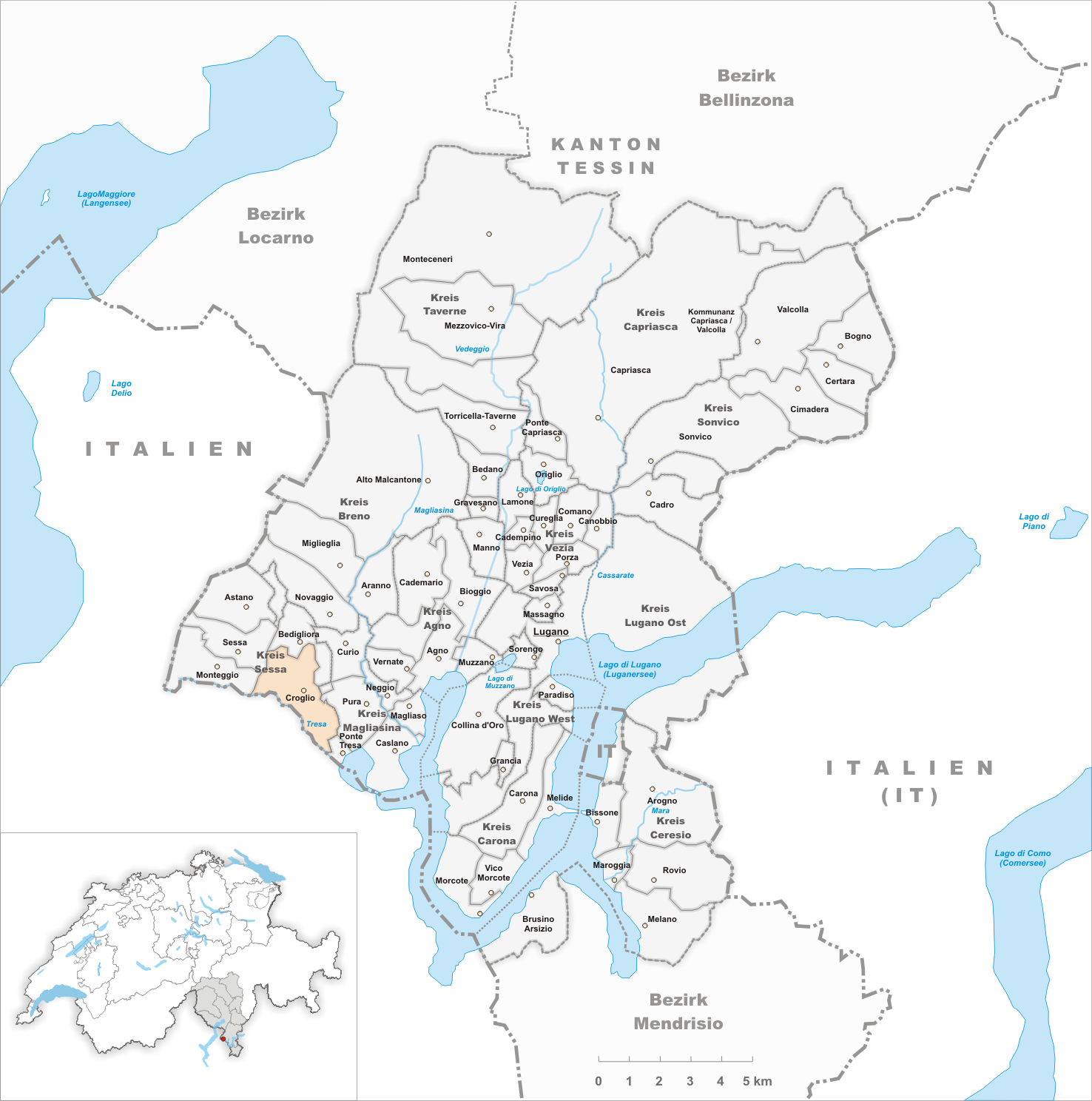 Municipality Croglio